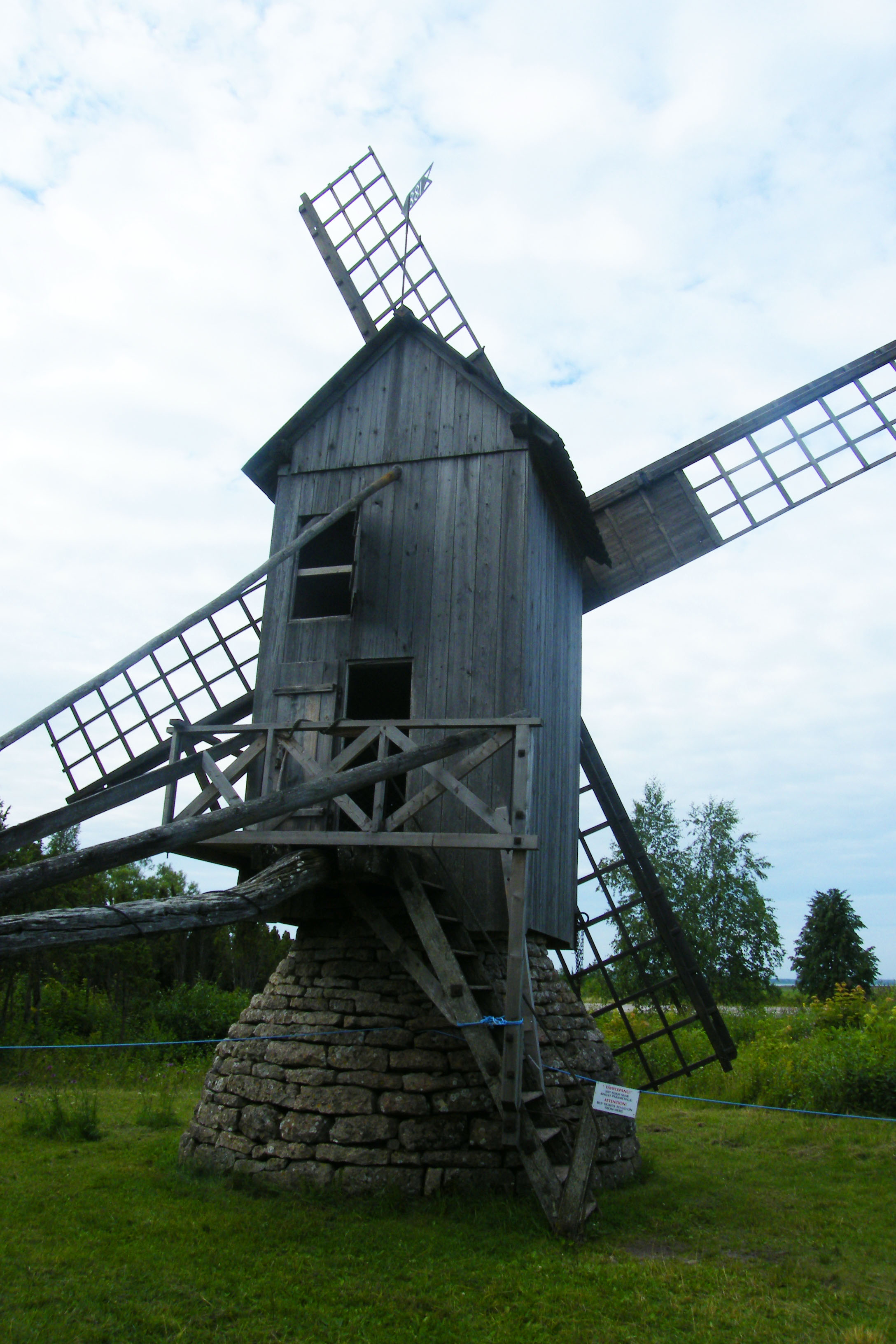 Eemu tuulik Muhu saarel